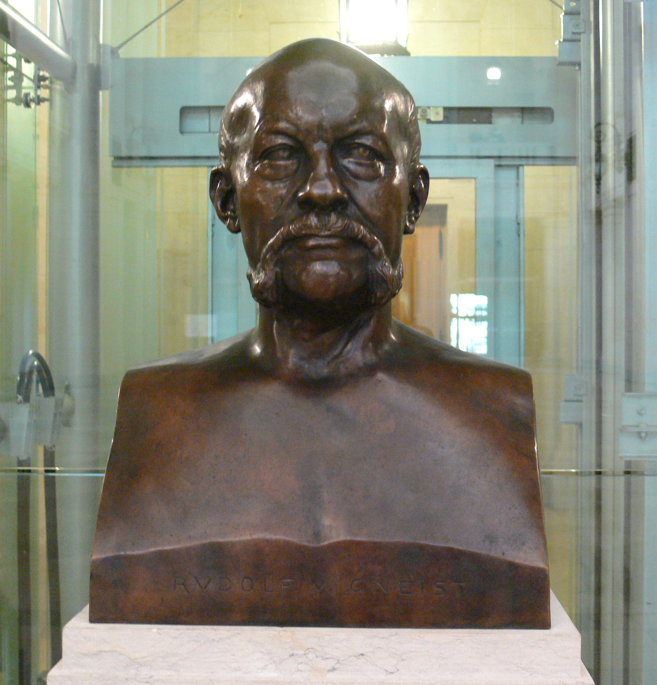 Leipzig, Reichsgerichtsgebäude Büste Rudolf von Gneist